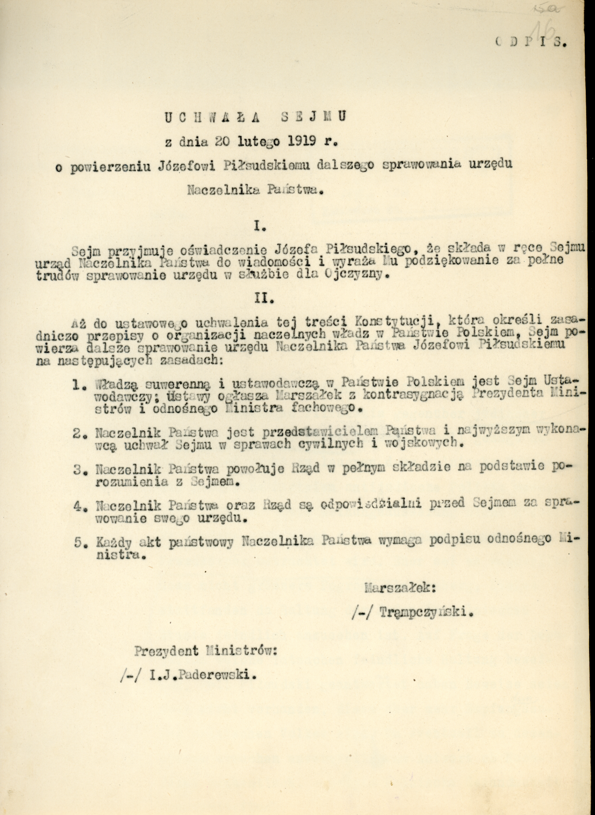 Uchwała Sejmu z 20 lutego 1919 roku o dalszym sprawowaniu urzędu Naczelnika Państwa przez Józefa Piłsudskiego